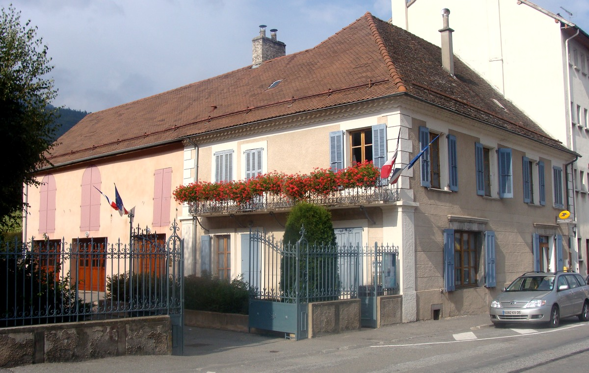 La nouvelle mairie de la Fare, aux Baraques. Sur la droite, l'agence postale communale.